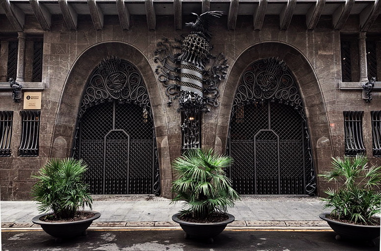 The entrance to Palau Guell, obra de Gaudí (1888) a Barcelona, Catalunya.